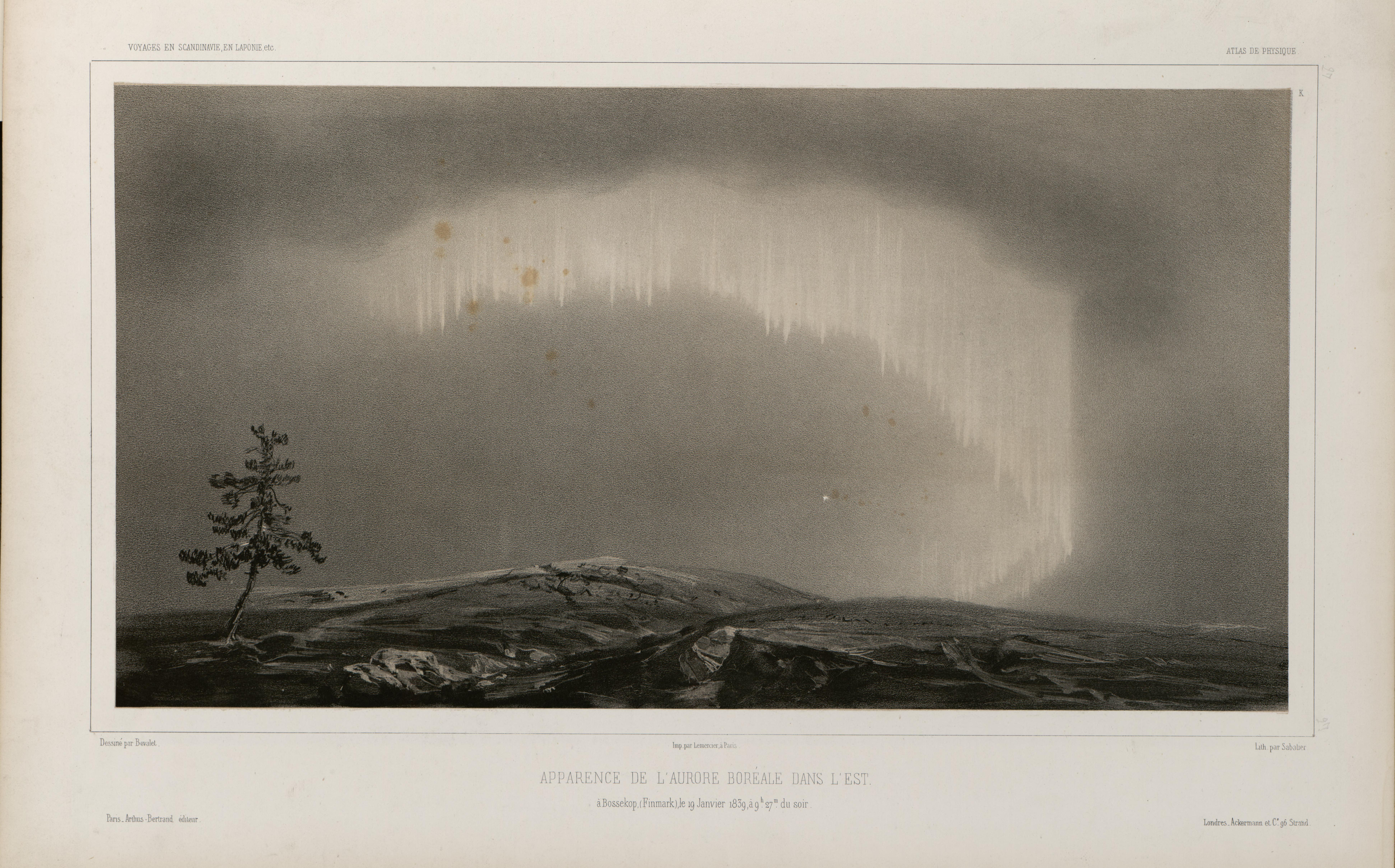 Illustrasjon hentet fra boken "Voyages de la Commission scientifique du Nord, en Scandinavie, en Laponie, au Spitzberg et aux Feröe" av ukjent forfatter og utgitt av Arthus BertrandParis : Arthus Bertrand, 1842-1855 (Paris, 185?)